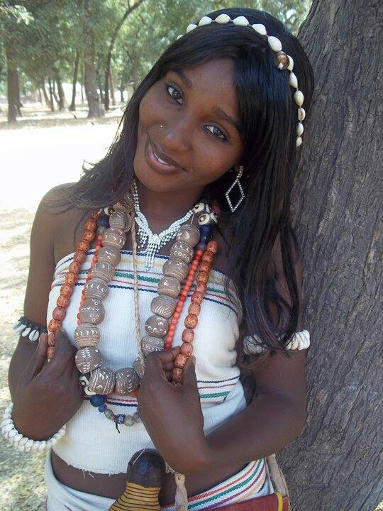 Elle incarne la beauté de la femme nordiste dans cette parure traditionnelle plus Bororo This is an image of Cultural Fashion or Adornment from Cameroon